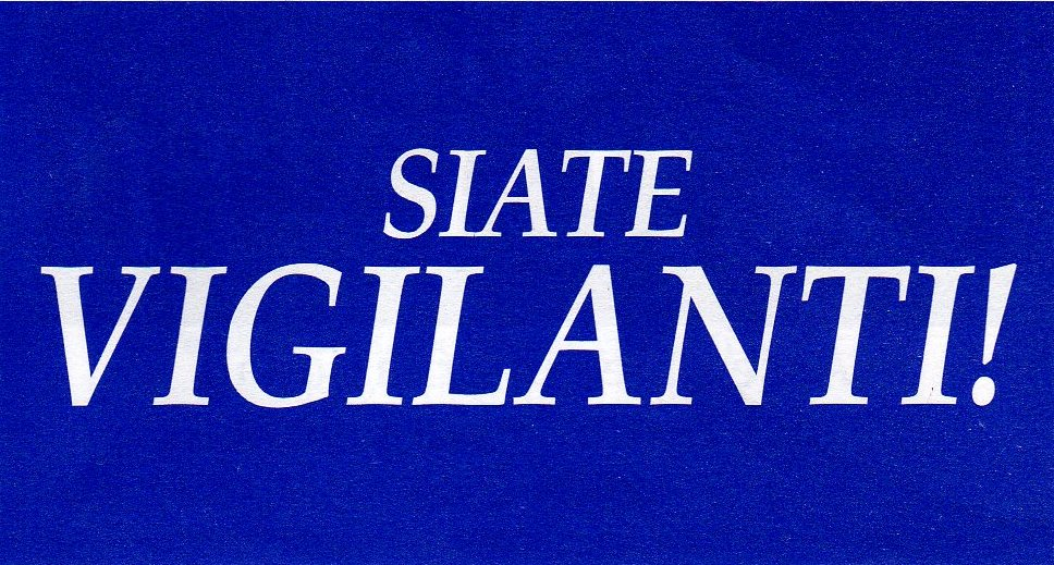 Logo dell'assemblea internazionale dei Testimoni di Geova 2009